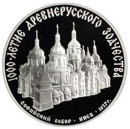 Памятная серебряная монета 3 рубля 1988 года «Софийский собор в Киеве. 1000-летие древнерусского зодчества» серии «1000-летие России».